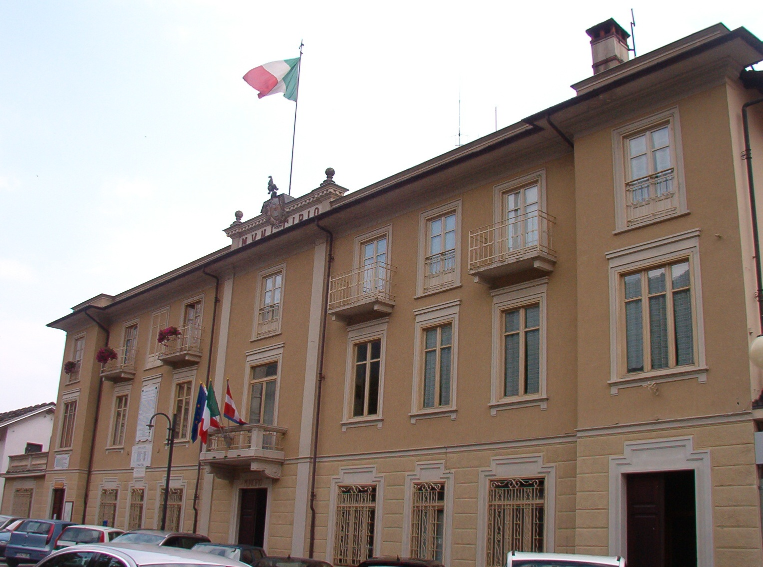 Municipio di Ceres - Piedmont - Italy